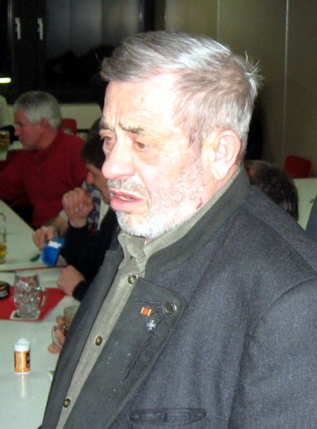 Werner Freund (* 2. März 1933 in Garbenteich; † 9. Februar 2014 in Merzig) war ein deutscher Wolfsforscher. Eigene Aufnahme von 2006